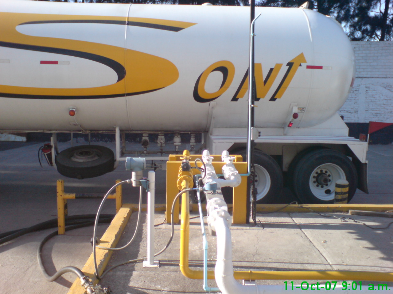 Descarga PG (PG Sonigas) en Tanques de Almacenamiento